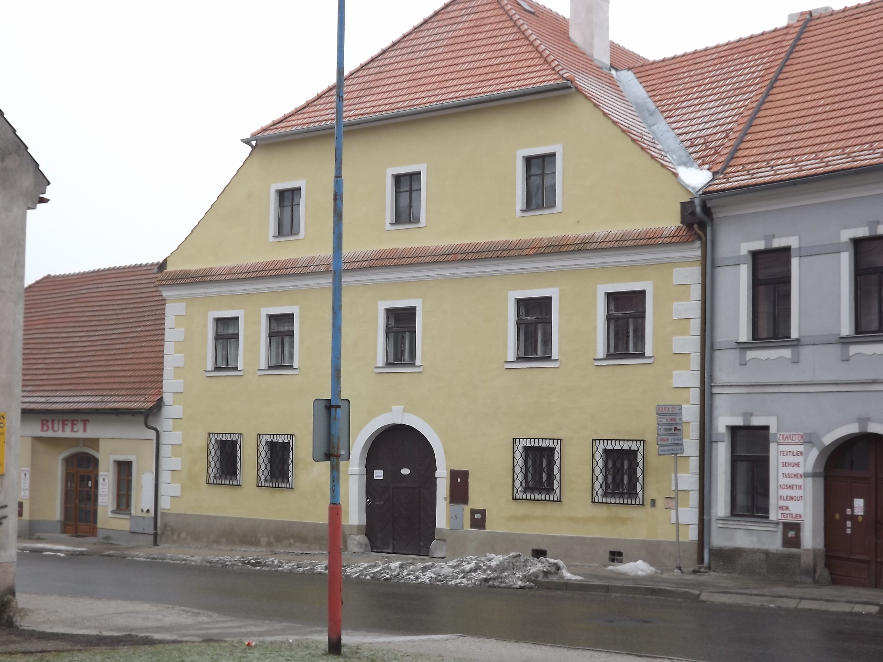 Fara (Nová Bystřice), Vídeňská 8, Nová Bystřice